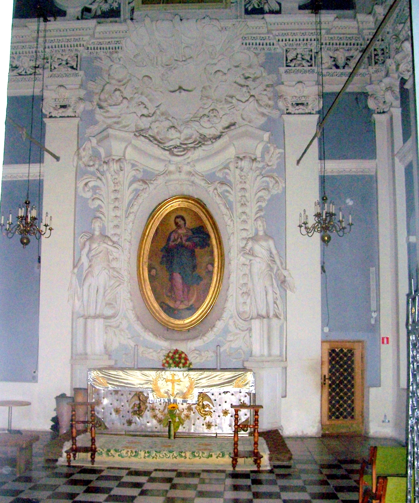 Ołtarz Królewski w Katedrze wileńskiej